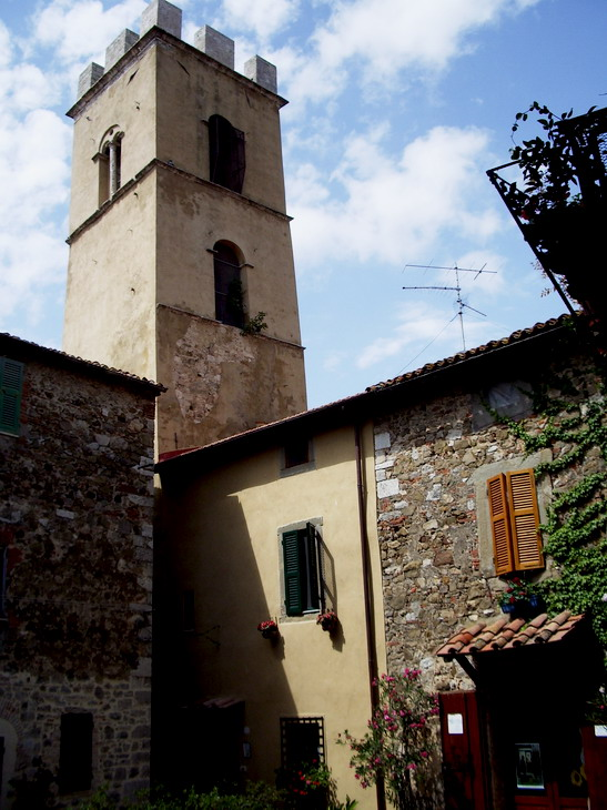 Torre di San Lorenzo Montemerano (GR), foto 18/08/2006